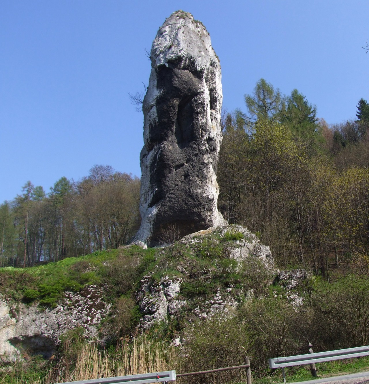 Maczuga Herkulesa i skała Fortepian